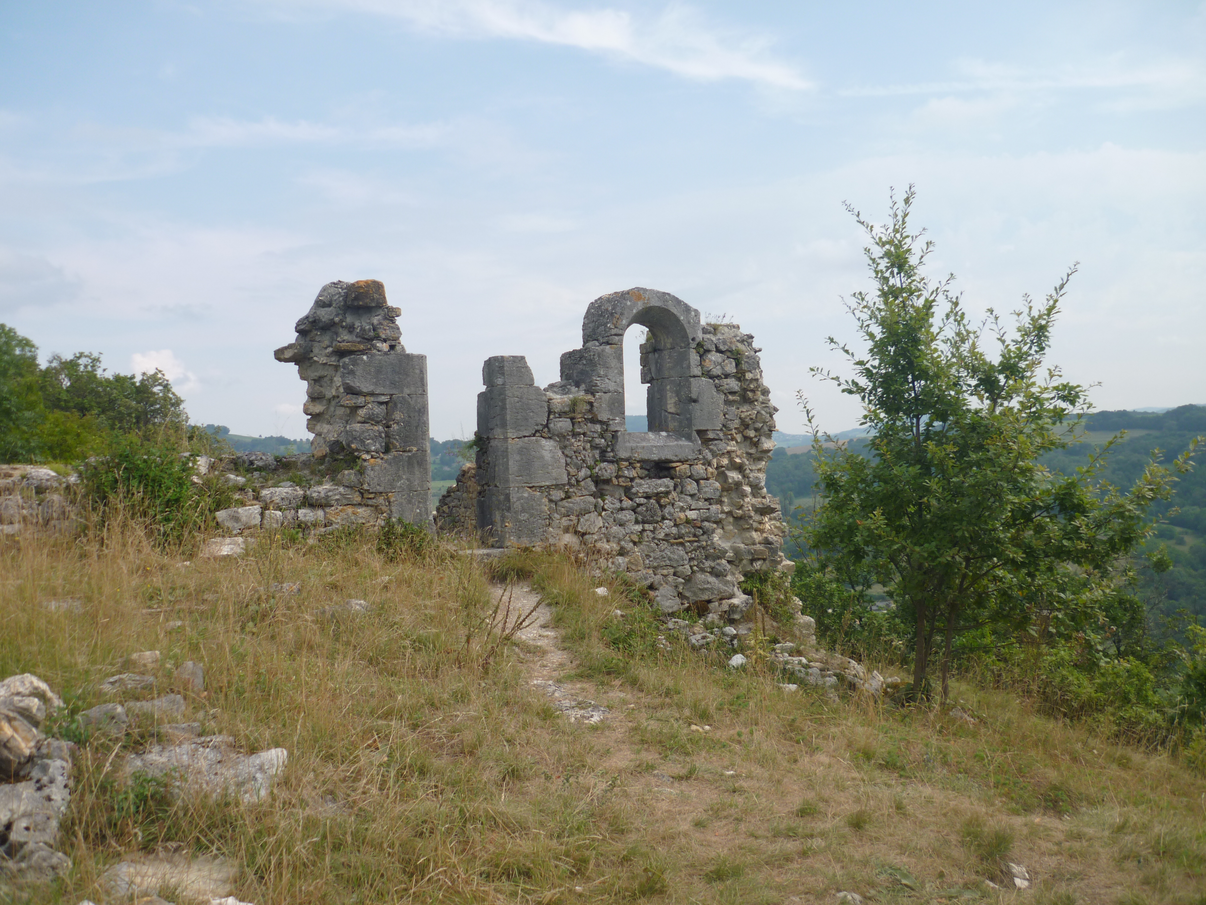 Ancienne église de St André, Val de Fier, Haute-Savoie, France